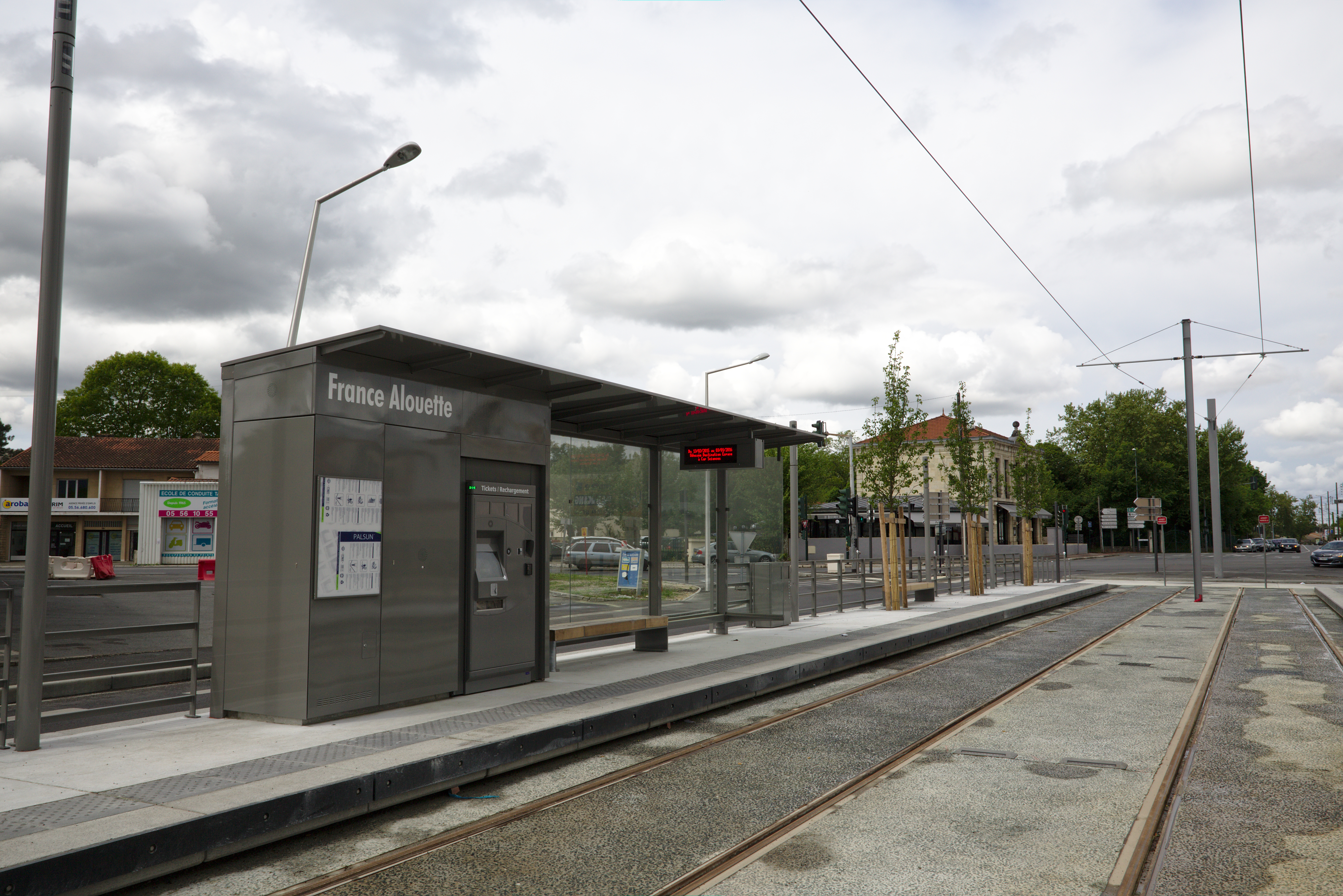 Nouveau terminus France Alouette à Pessac Alouette.